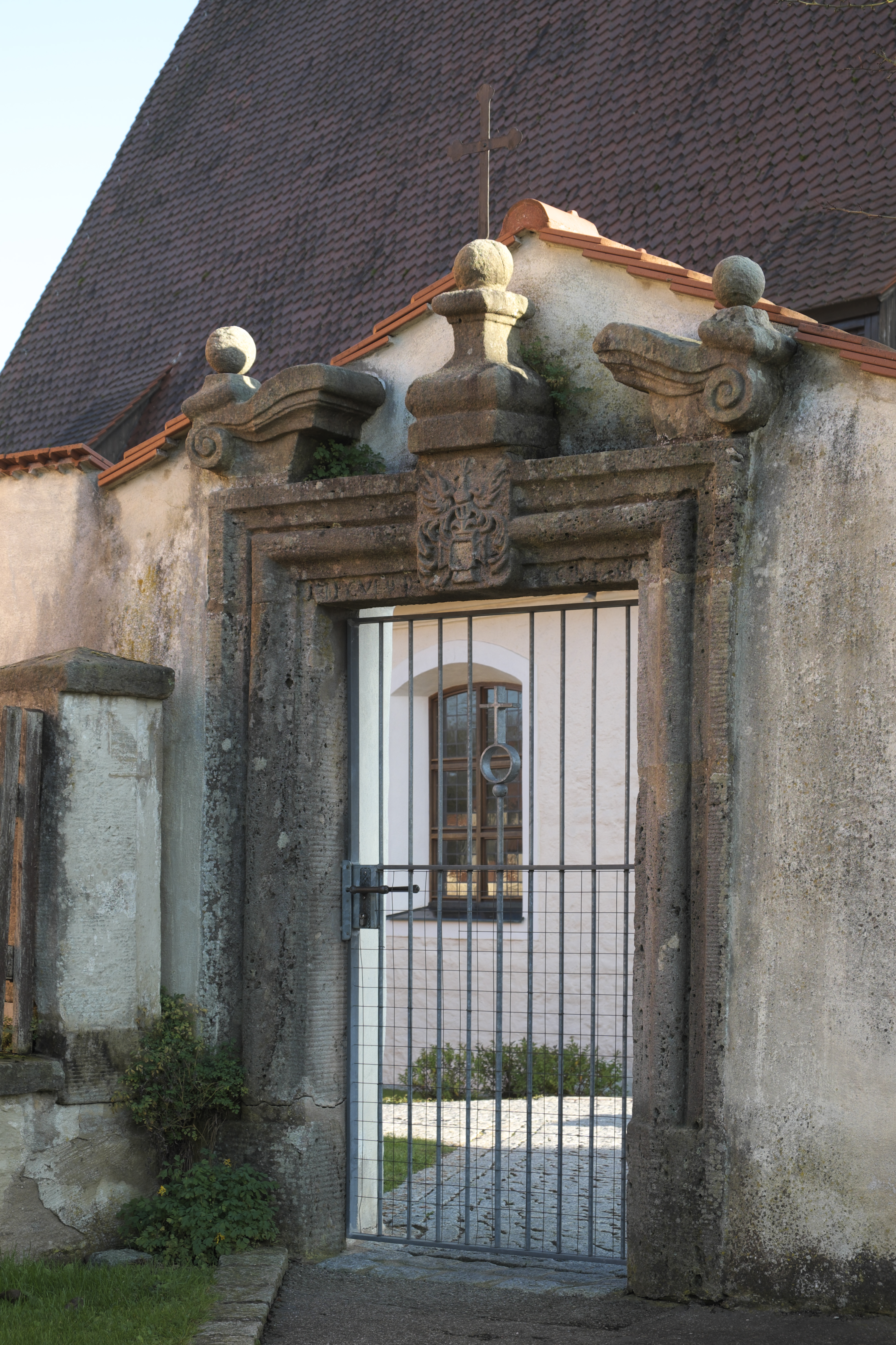 Friedhofstor in Halsbach, einem Ortsteil von Dürrwangen im Landkreis Ansbach (Mittelfranken/Bayern), Wappen des Deutschen Ordens